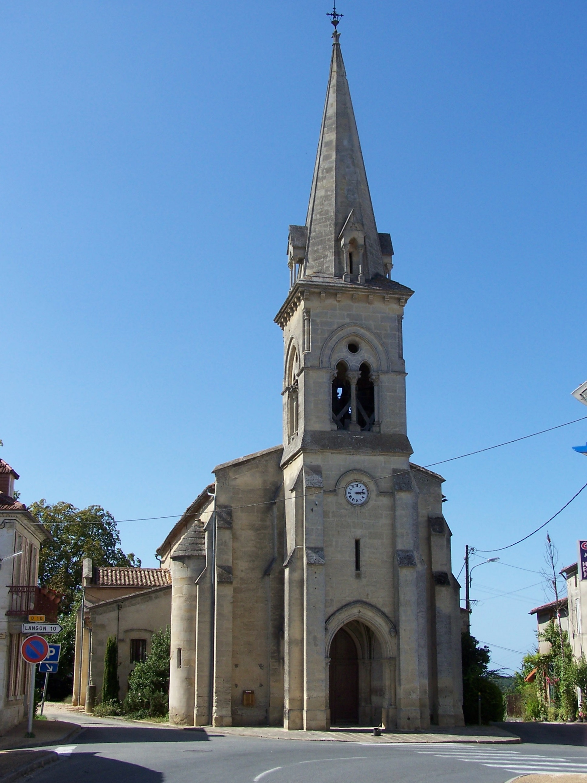 Église d'Auros, Gironde, France